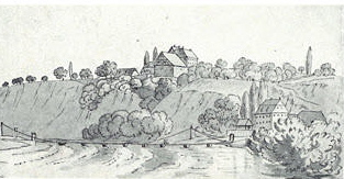 Castle Harteneck (Ludwigsburg/Germany)